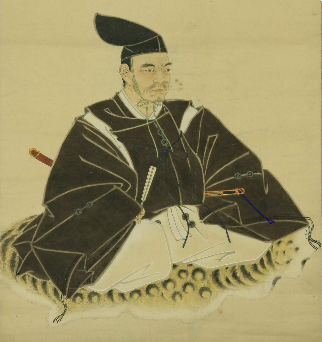 Der japanische Gelehrte Arai Hakuseki (1657-1725)